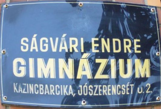 Ságvári Endre Gimnázium táblája (Kazincbarcika, Jószerencsét út 2.)